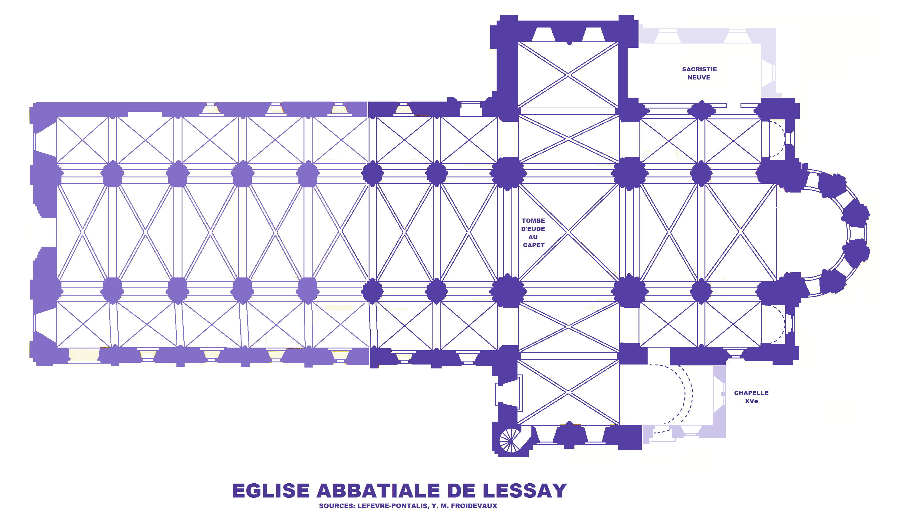 Abbaye de Lessay, Plan